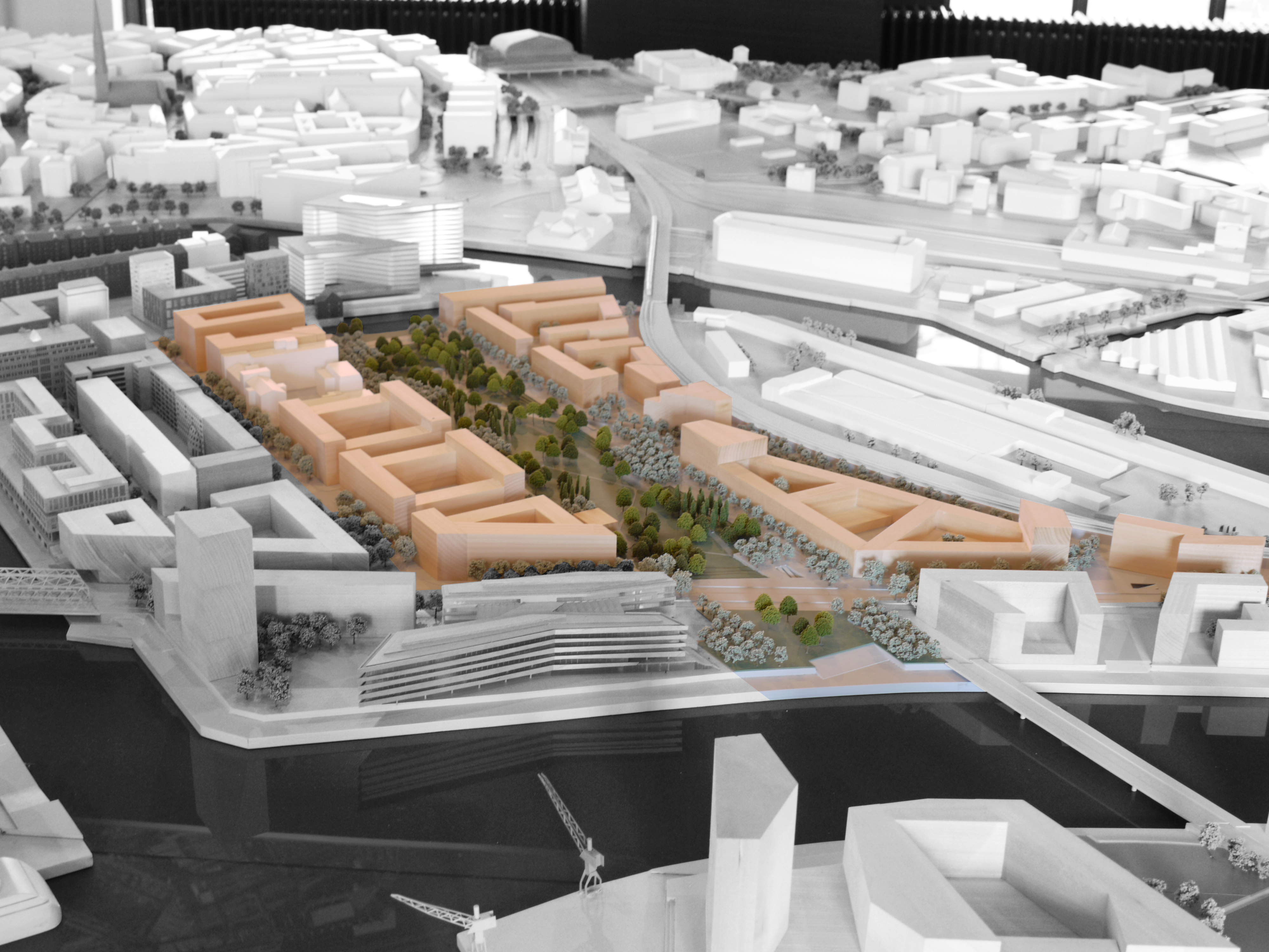 Modell des Teilquartiers Am Lohsepark in der HafenCity in Hamburg.